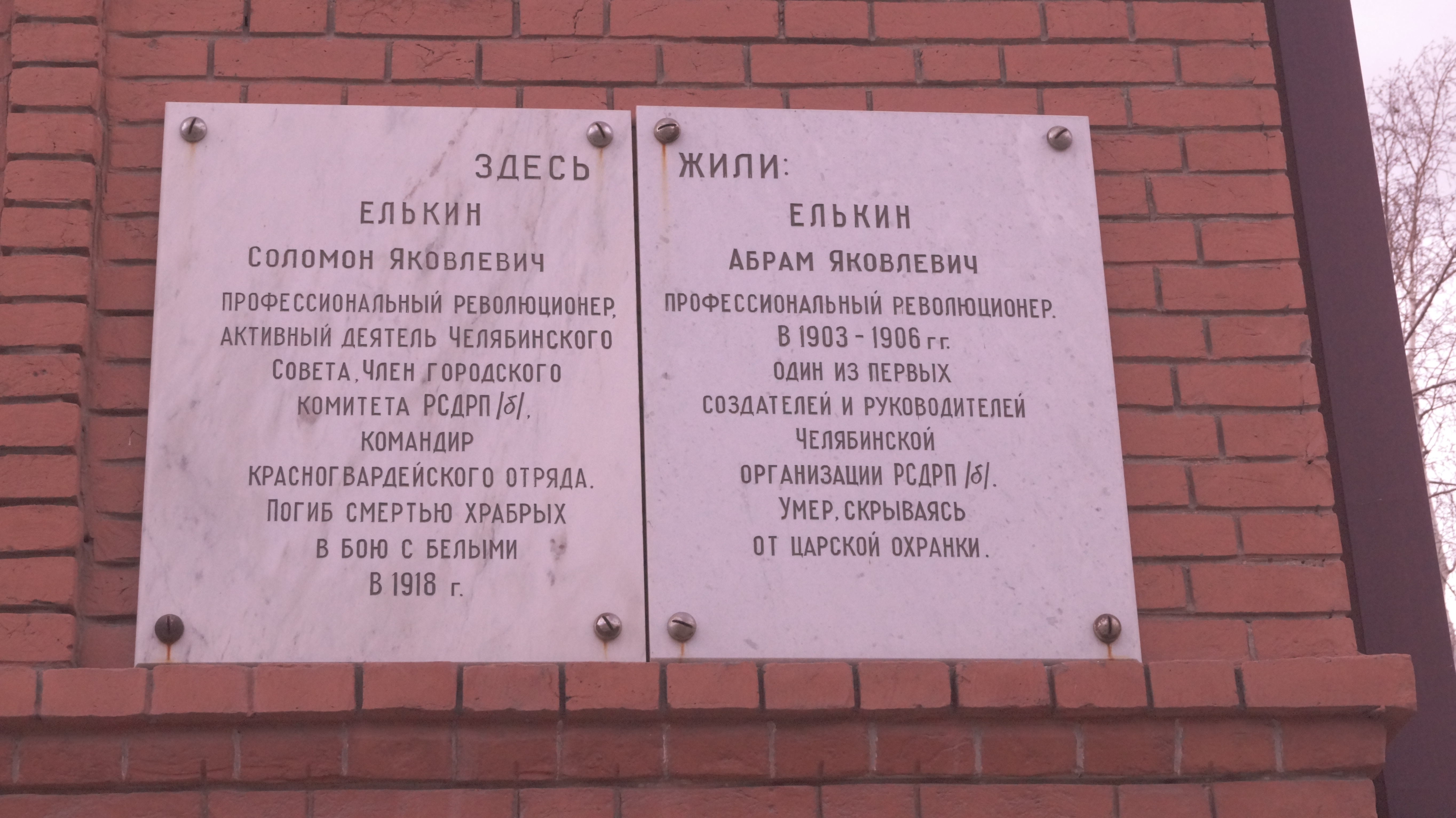 Мемориальная доска на доме С. Елькина и А. Елькина в Челябинске по адресу: ул. Елькина, 24